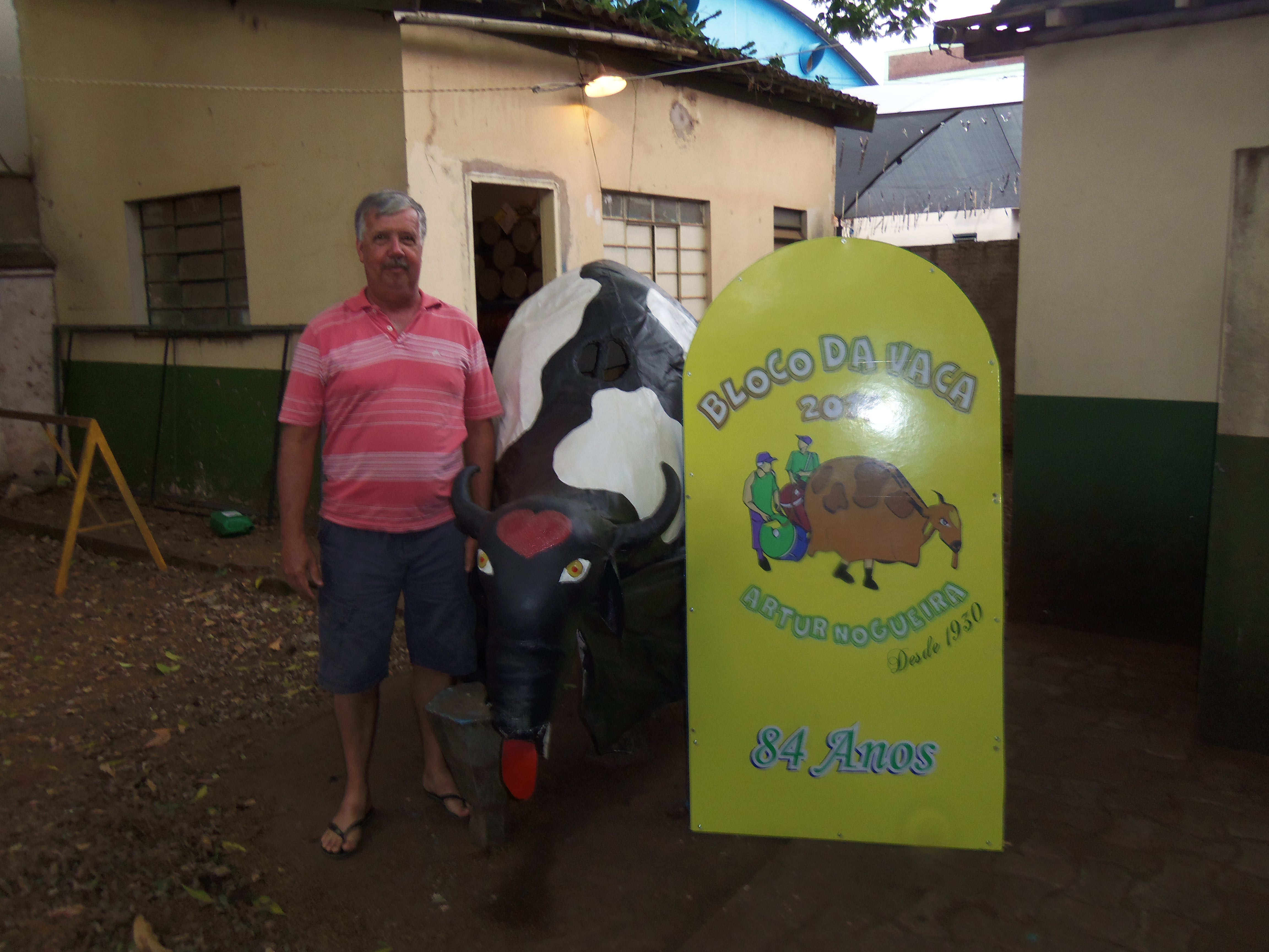 Foto da vaca, utilizada no Bloco da vaca, com um de seus organizadores, Eduardo Pietrobom (Duda)